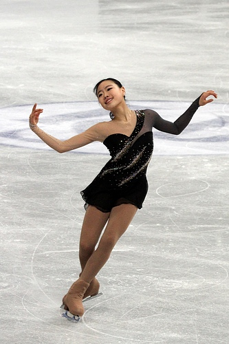 Kim Hae-Jin (Южная Корея) на чемпионате мира по фигурному катанию среди юниоров 2012